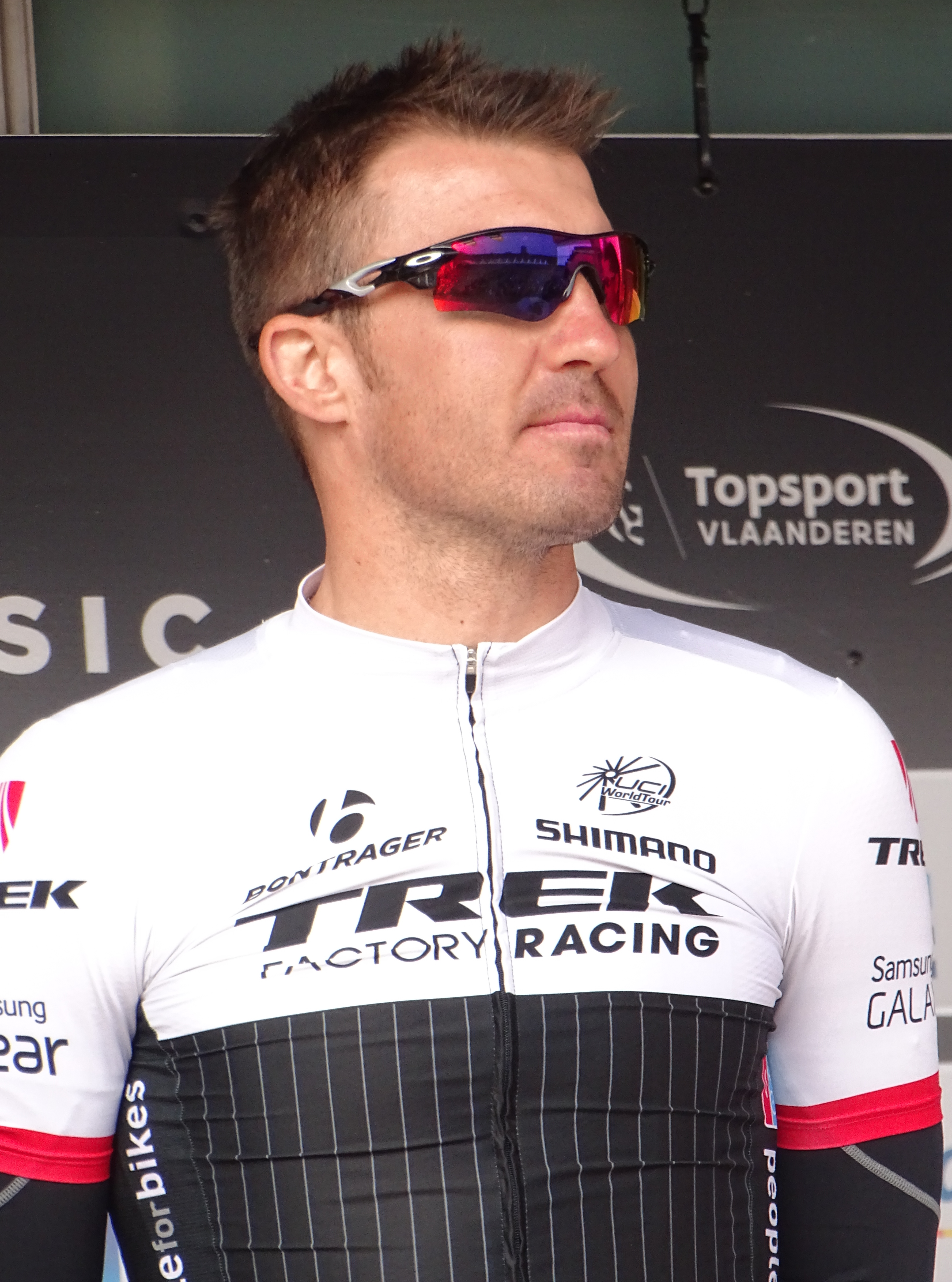 Reportage réalisé le mercredi 8 avril à l'occasion du départ du Grand Prix de l'Escaut 2015 à Anvers, Belgique.